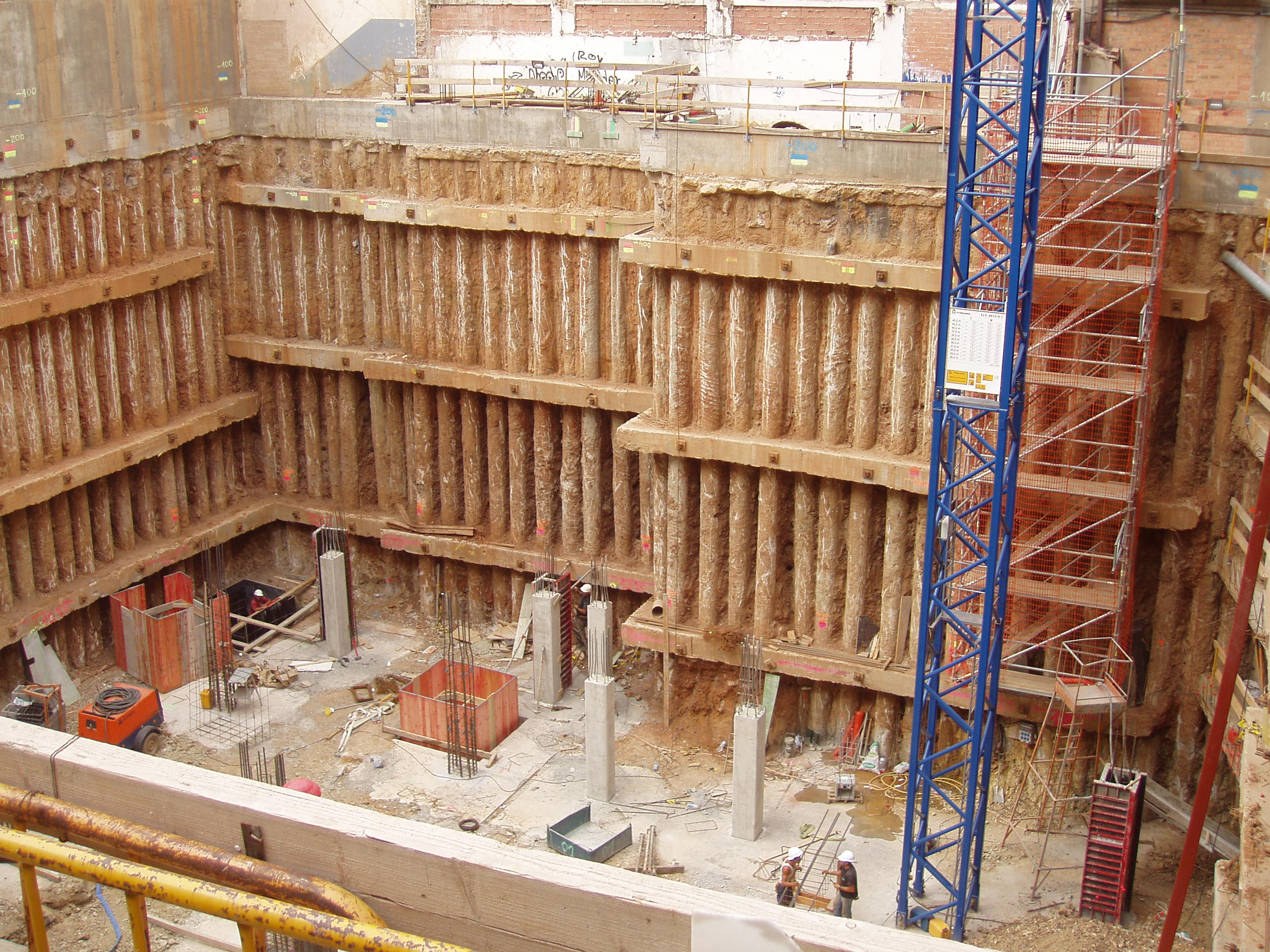 Construcción de una pantalla de pilotes. Barcelona.